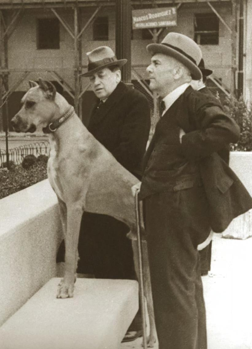 Fotografía de Arturo Alessandri Palma (al fondo), Presidente de Chile (1920-1925; 1932-1938) junto a su perro Ulk y el ministro Gustavo Ross Santa María, visitando unas obras en el Barrio Cívico de Santiago de Chile a mediados de la década de 1930.